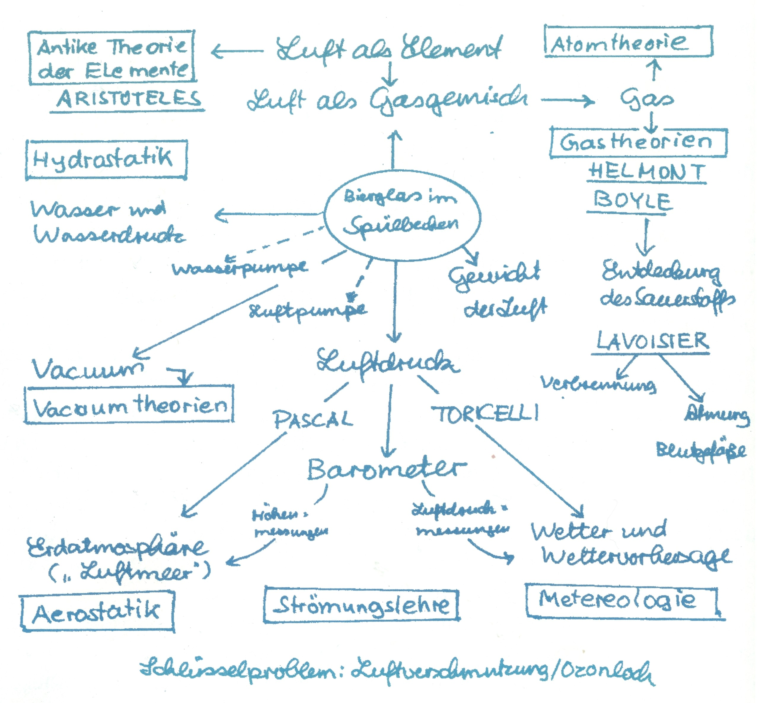 "Thematische Landkarte" des auf Martin Wagenschein basierenden Lehrstücks "Pascals Barometer" (1997)